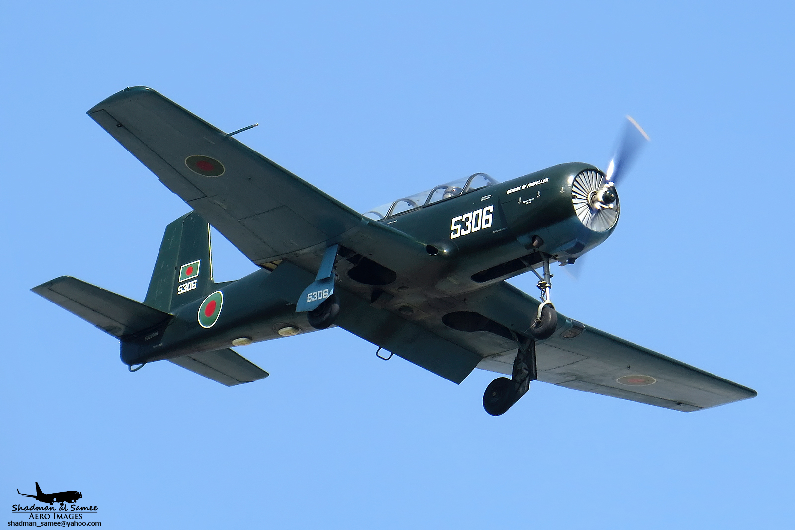 VGHS 2016.